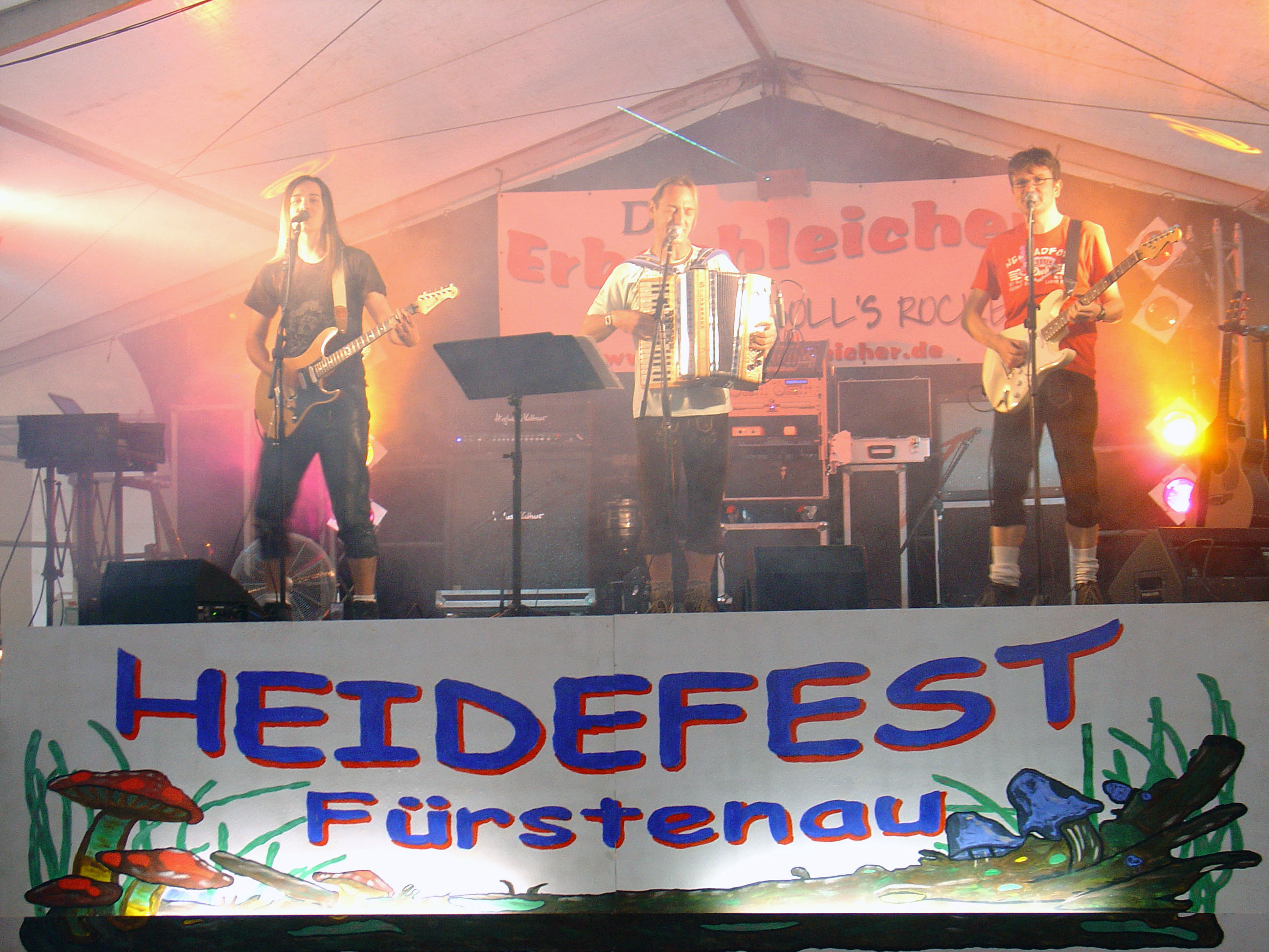 De Erbschleicher beim Heidefest in Fürstenau (Altenberg)